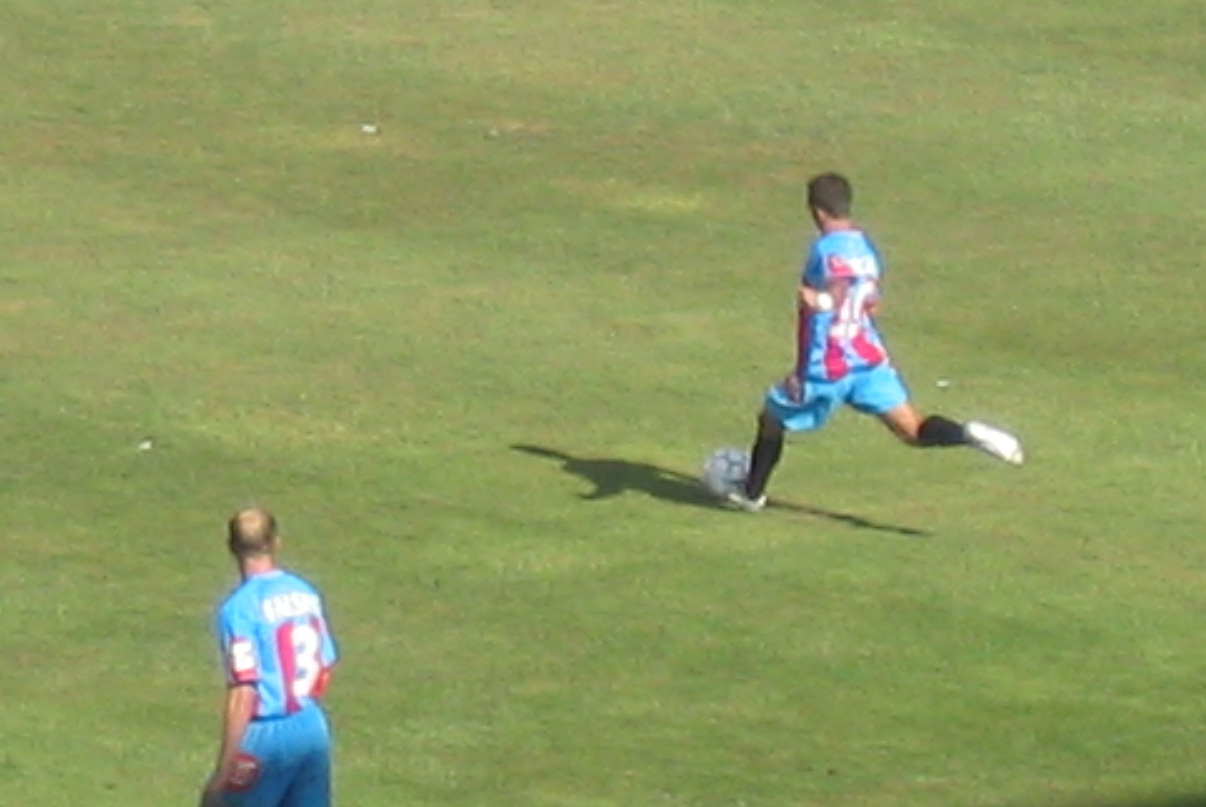 Giuseppe Mascara tira una punizione in Catania-Atalanta 0-0 guardato da Gianluca Falsini